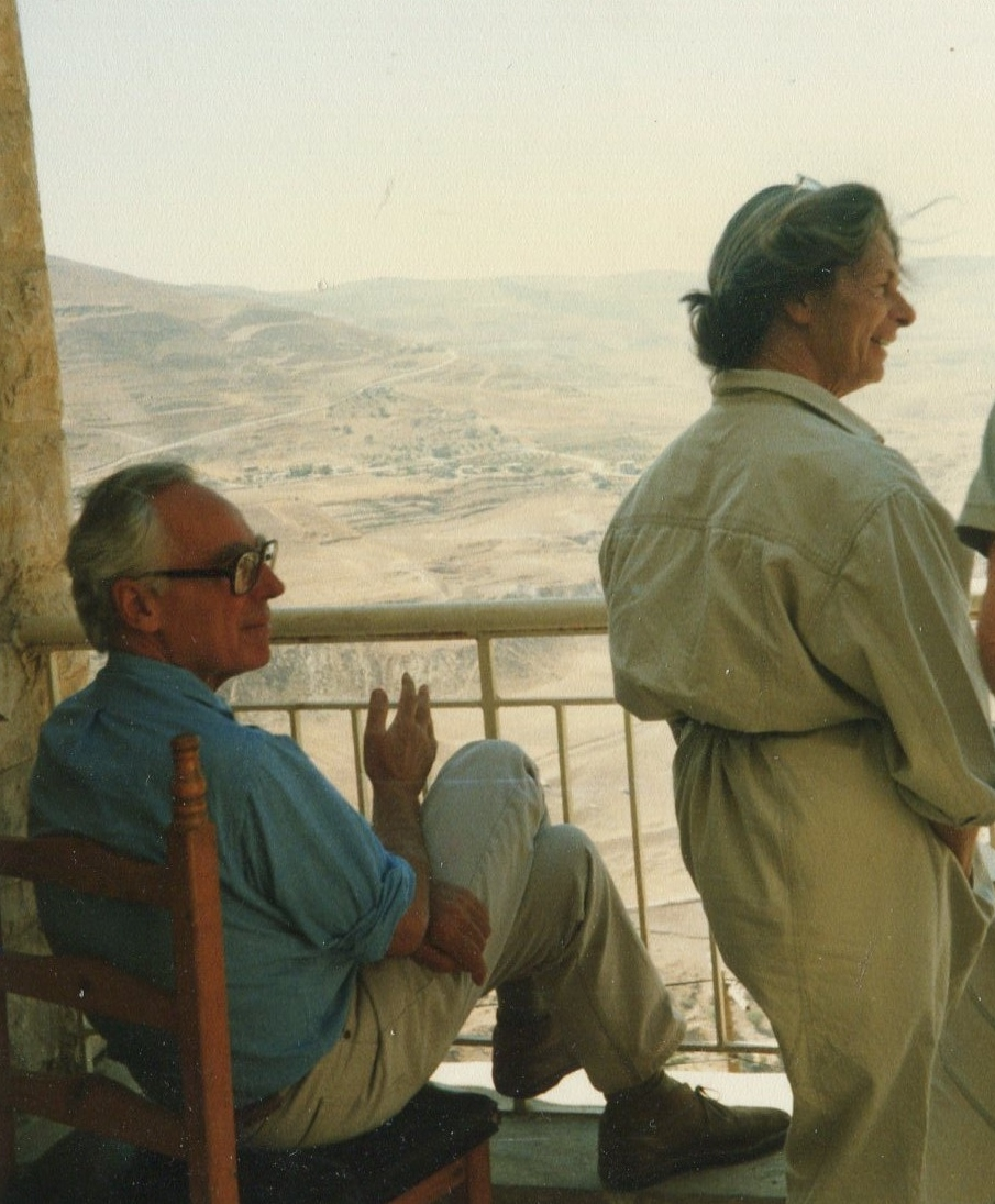 Axel von Saldern, Direktor des Museums für Kunst und Gewerbe, mit Ehefrau Maria auf Bildungsreise in Jordanien mit der Justus-Brinckmann-Gesellschaft. Das Foto entstand gleich nach der Ankunft im Hotel. Das Ehepaar ging ans Fenster, um in aller Ruhe die Landschaft in sich aufzunehmen